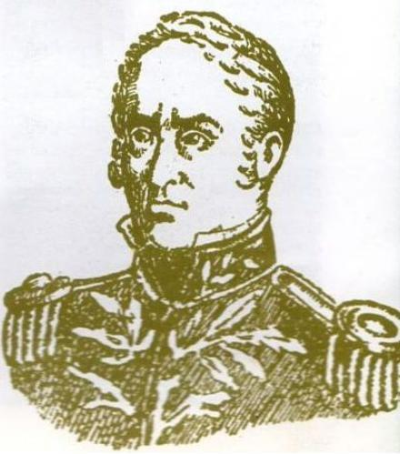 Efigie del hacendado y militar de las luchas artiguistas y de la independencia de Uruguay, Tomás García de Zúñiga.